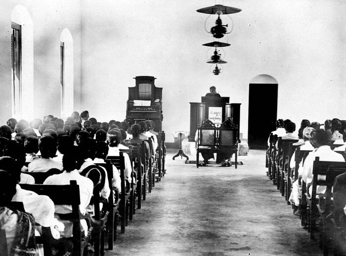 Repronegatief. Een christelijke huwelijksplechtigheid in een lokale kerk te Swaru, Java.